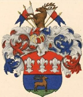 Lilienfeldi suguvõsa aadlivapp